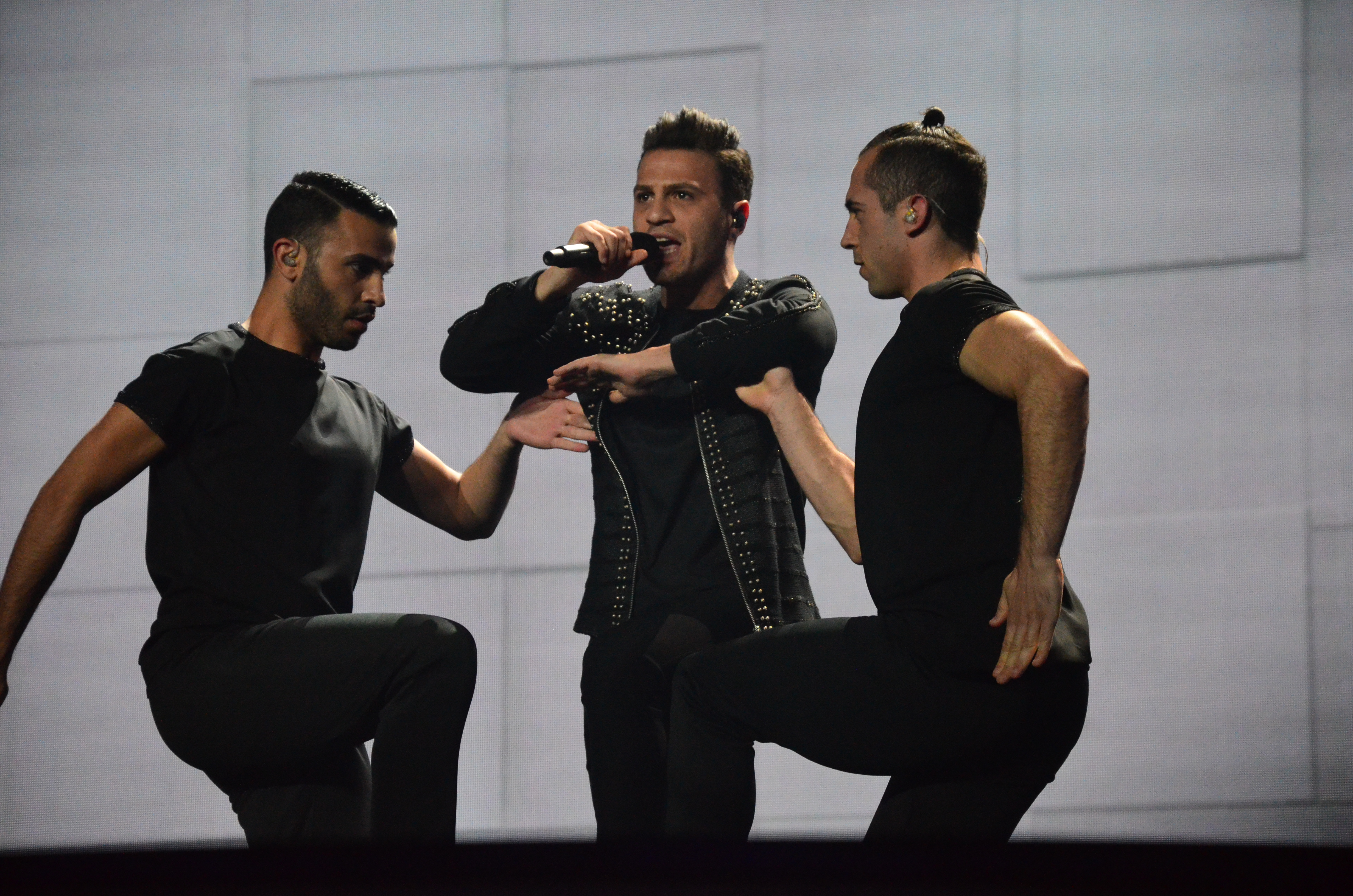 Hovig (Cyprus). Генеральна репетиція фіналу Євробачення.